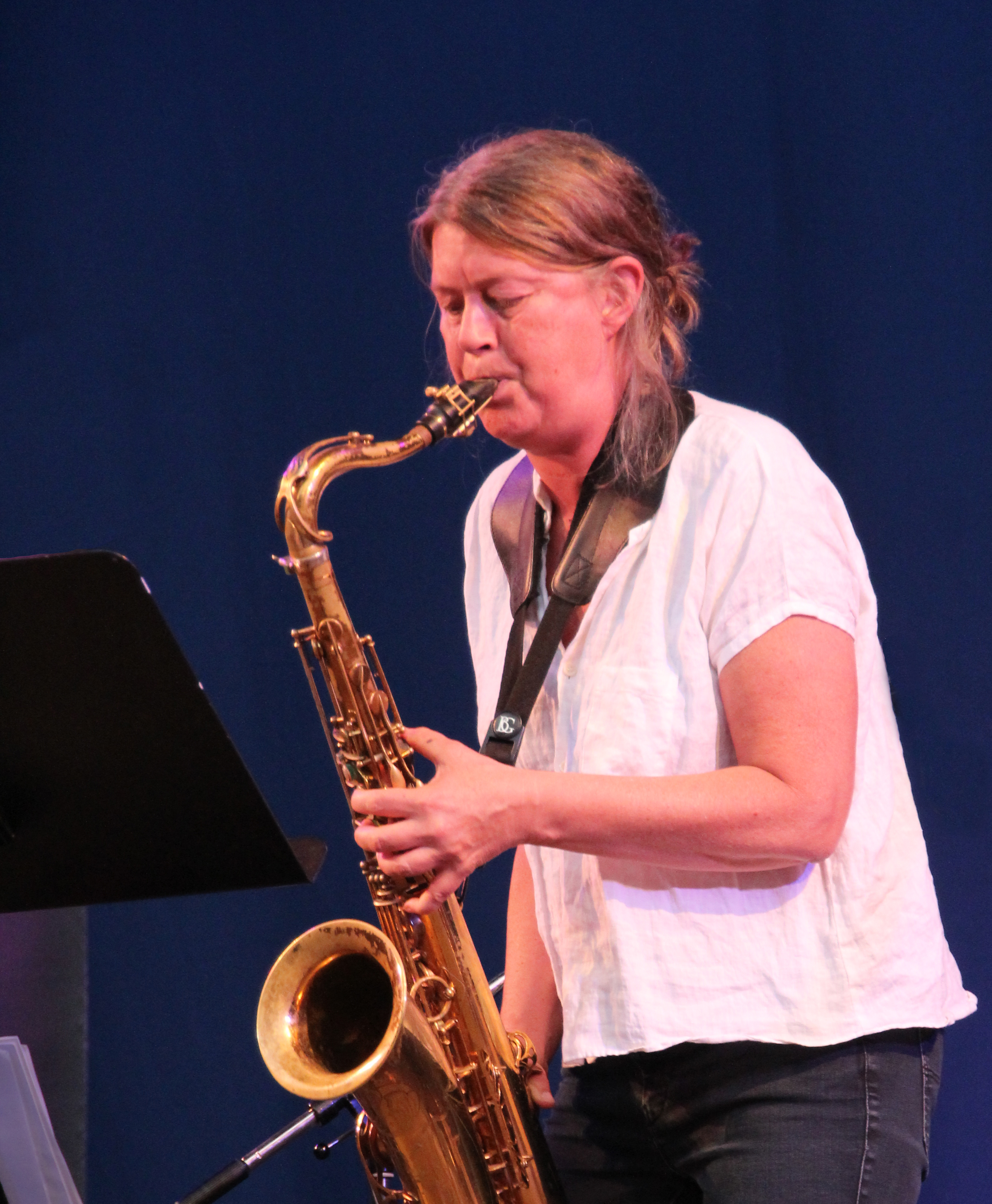 Bildinhalt: Lotte Anker bei einem Auftritt im Frankfurter Palmengarten Aufnahmeort: Frankfurt am Main, Deutschland Die dargestellte Person wurde bei einem öffentlichen Auftritt fotografiert.